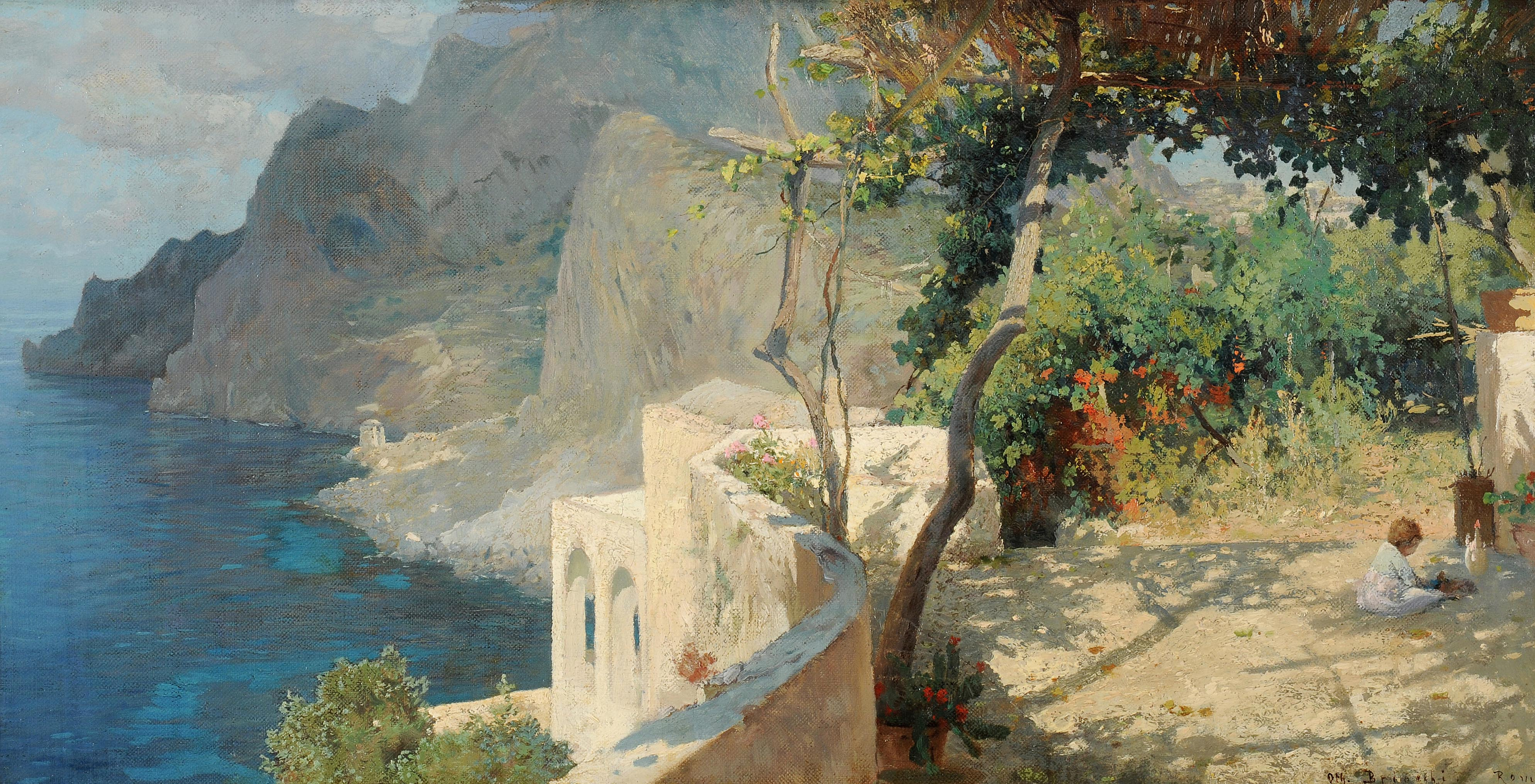 Othmar Brioschi: Capri. Öl auf Leinwand, 37,5 x 73 cm, rechts unten signiert und bezeichnet „Oth. Brioschi. Rom“